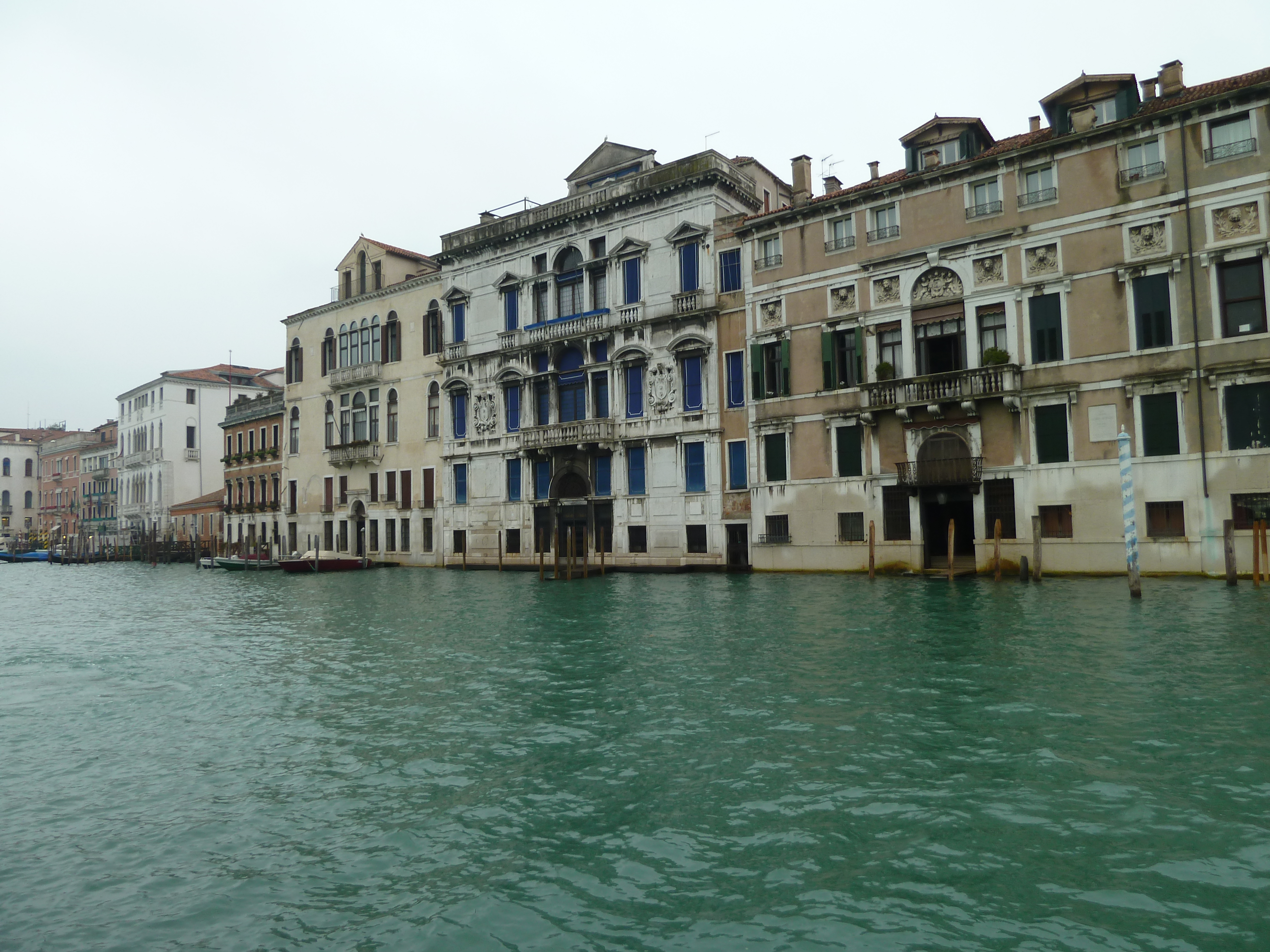 Palazzi Mocenigo (Venice)